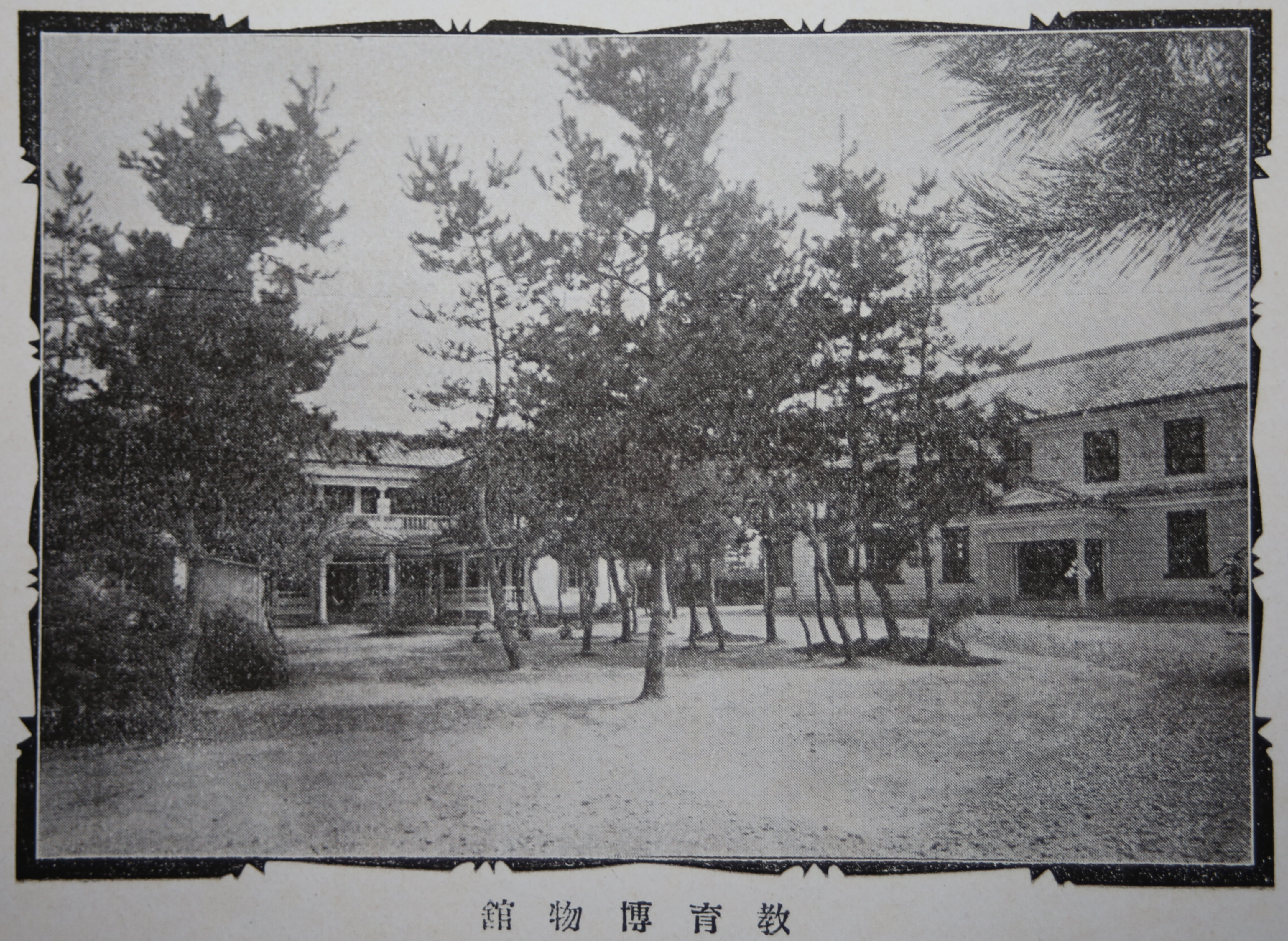 名古屋案内』（名古屋開府三百年記念会編、扶桑新聞社、1910年3月発行）9ページ掲載の「教育博物館」の写真。撮影時期および撮影者は不明。名古屋市東区大曽根町（当時）に所在した教育博物館を写したものという。